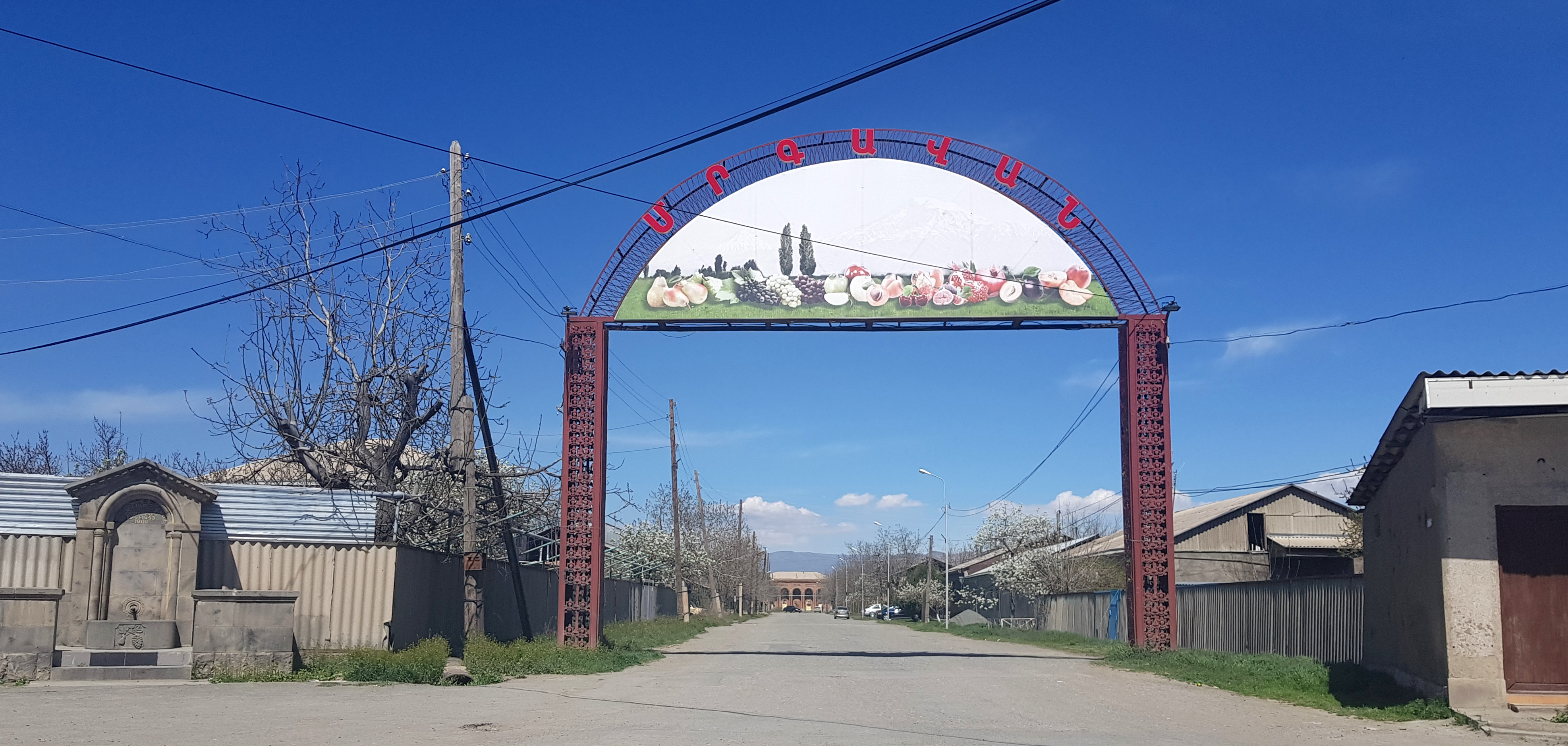 Մրգավան գյուղի մուտքը, ձախ կողմում՝ հուշաղբյուր` նվիրված Երկրորդ աշխարհամարտում զոհվածներին 61/4